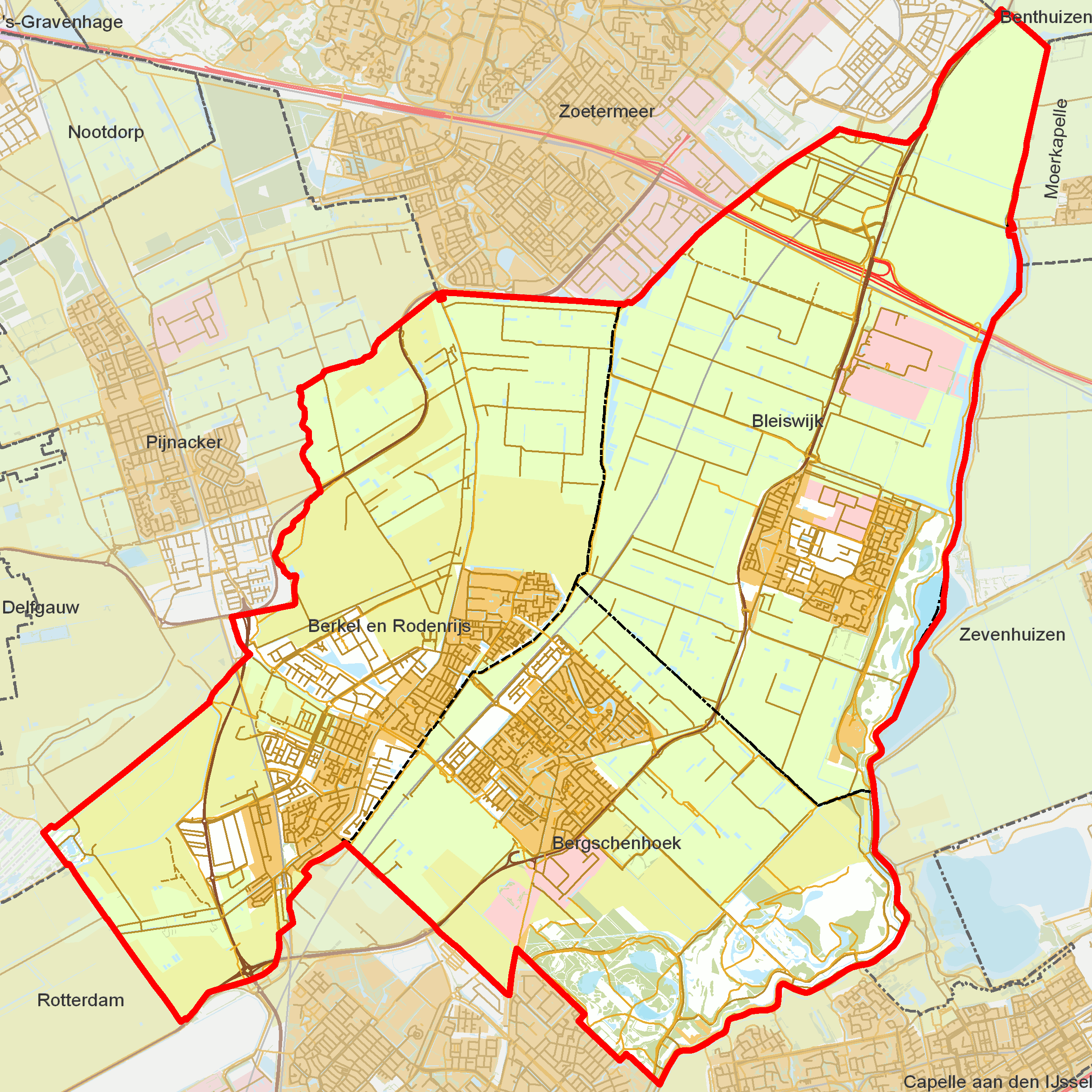 BAG woonplaatsen - Gemeente Lansingerland.png